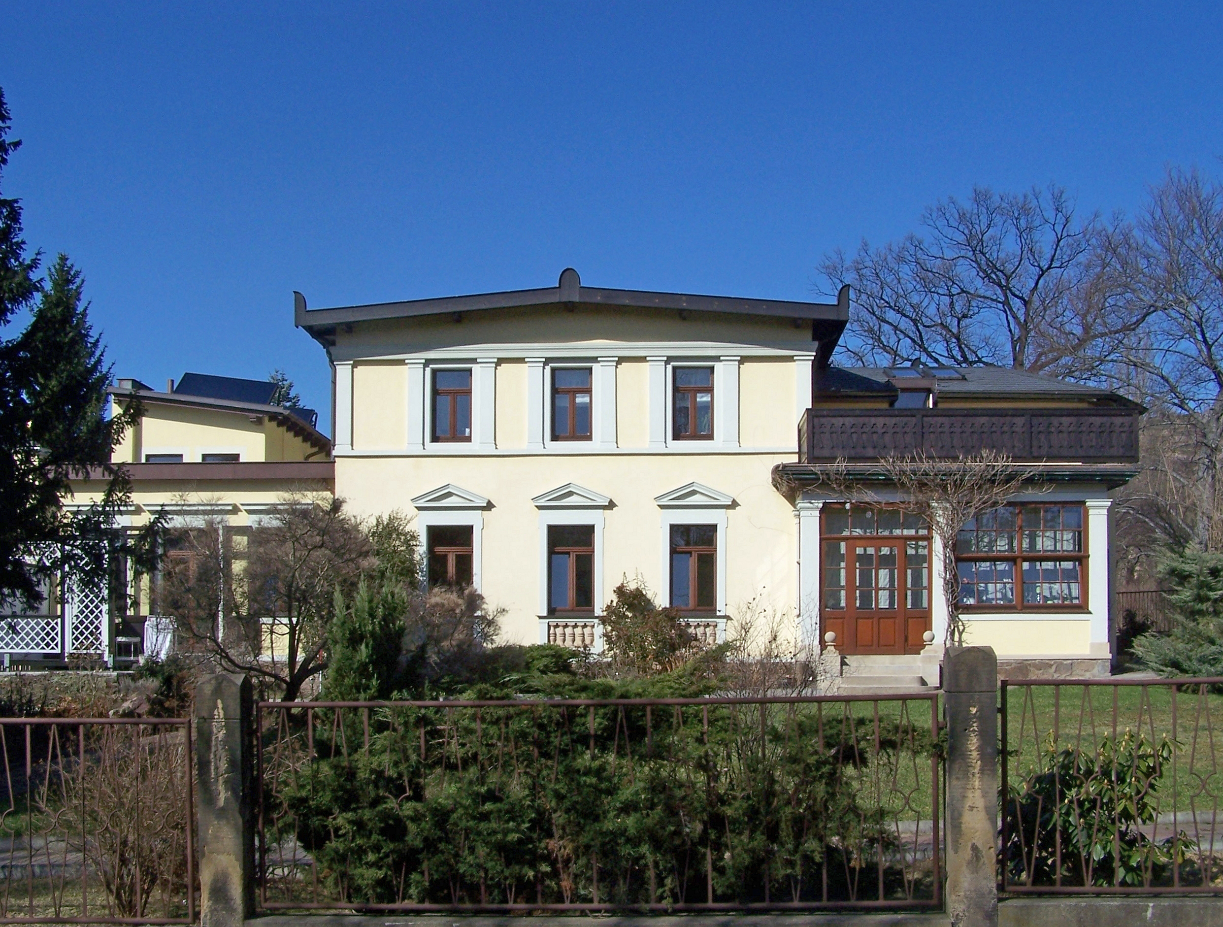 Villa Agnes (Lößnitzgrundstr. 2, ehemals Nizzastr. 13) in Radebeul, von 1891 bis 1895 Wohnsitz von Karl May